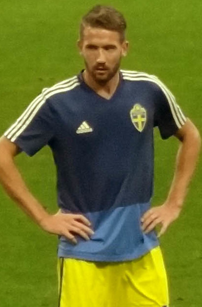 23 июня 2018 года на ЧМ-2018 сборная Германии выиграла на стадионе «Фишт» Швецию со счётом 2:1.